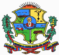 Escudo del municipio Sifontes, estado Bolívar, Venezuela